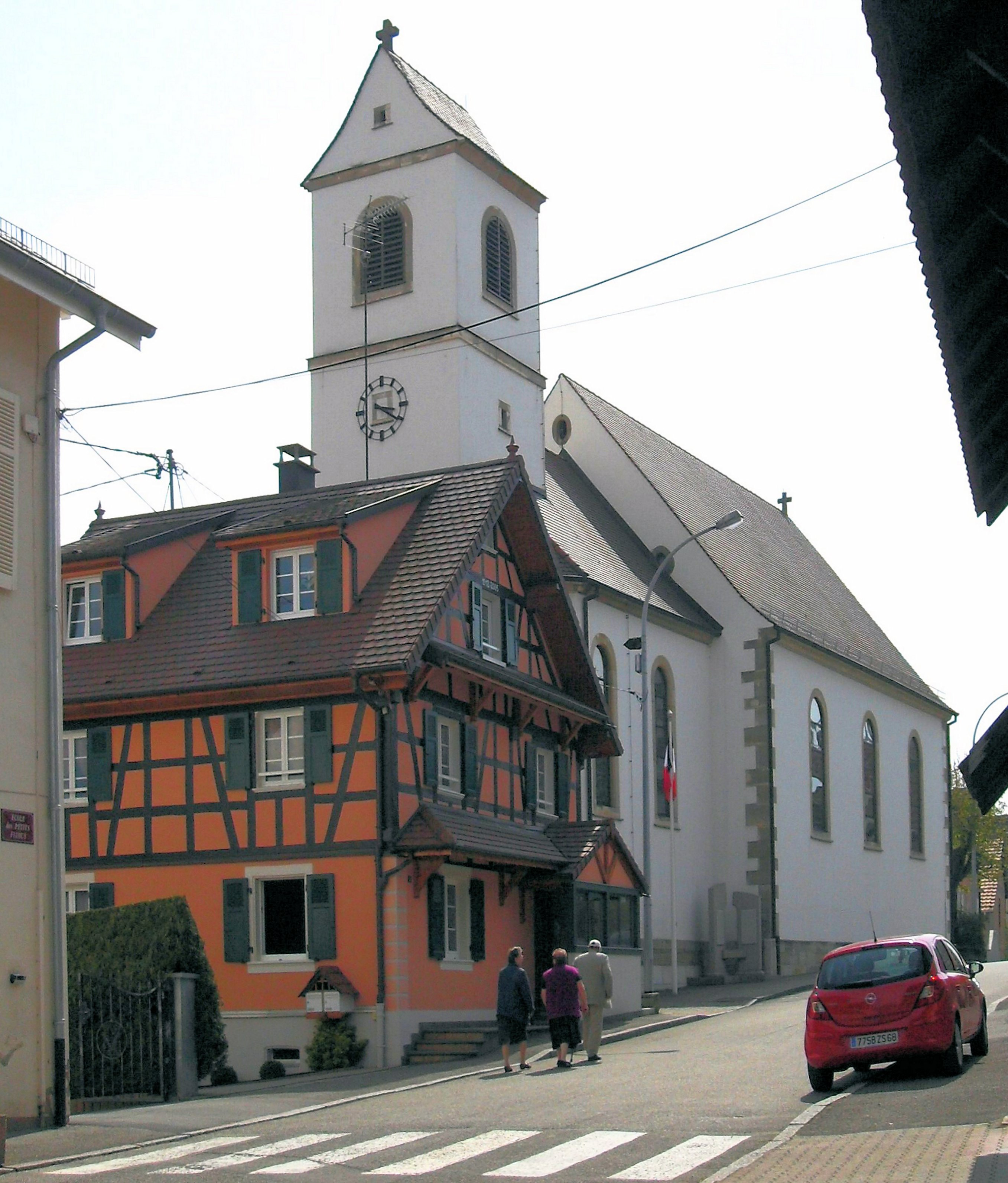 L'église Saint-Etienne à Ranspach-le-Haut